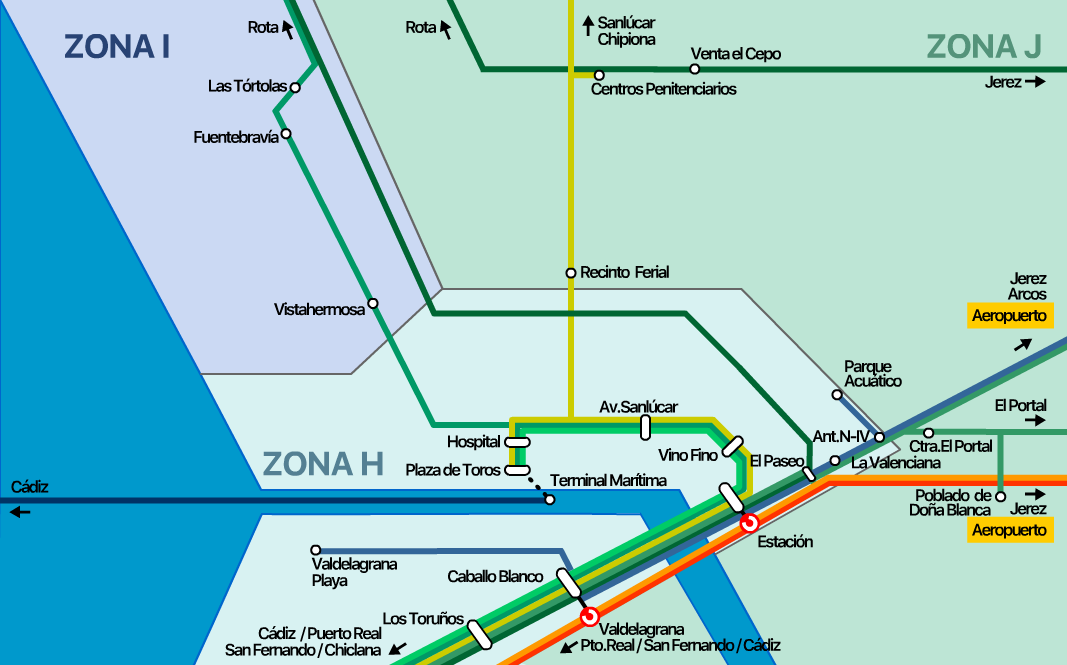 Líneas metropolitanas de El Puerto de Santa María